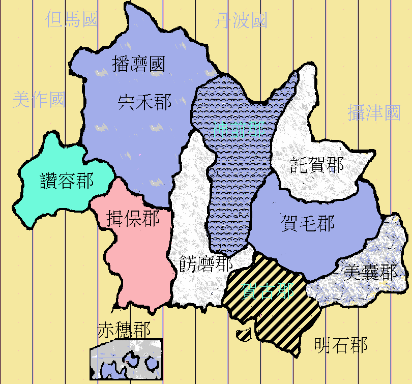 這是播磨國的地圖，是本人所繪，採用創作共用授權發佈。(by Itsminecookies)